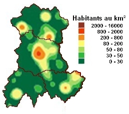 Densité de population de la l'anciennerégion Auvergn en 2006 d'après un document INSEE consulté le 12/06/2015 sur la page